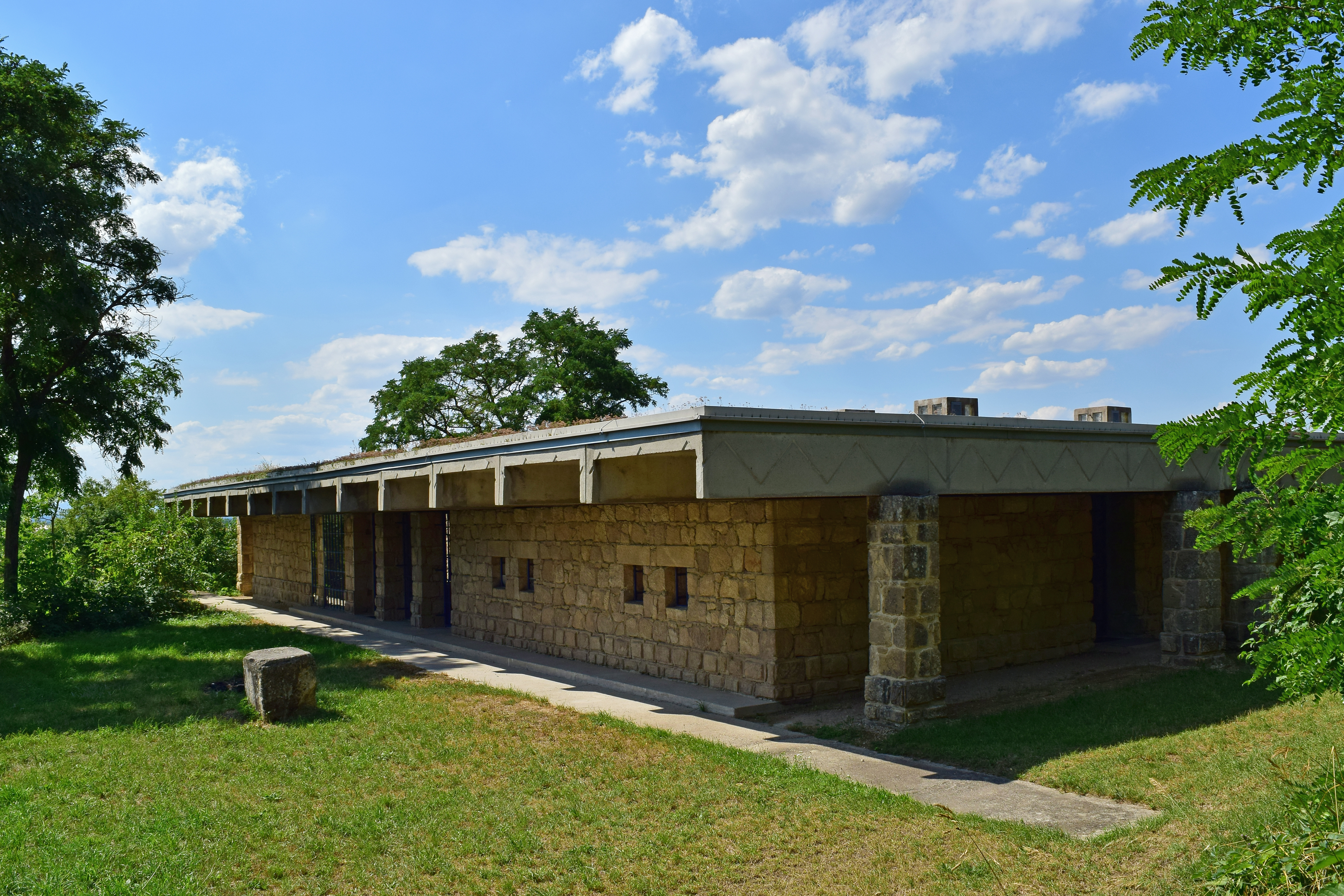 Das Bildhauerhaus wurde von 1965 bis 1967 nach Plänen des Architekten Johann Georg Gsteu für das Bildhauersymposion St. Margarethen errichtet.